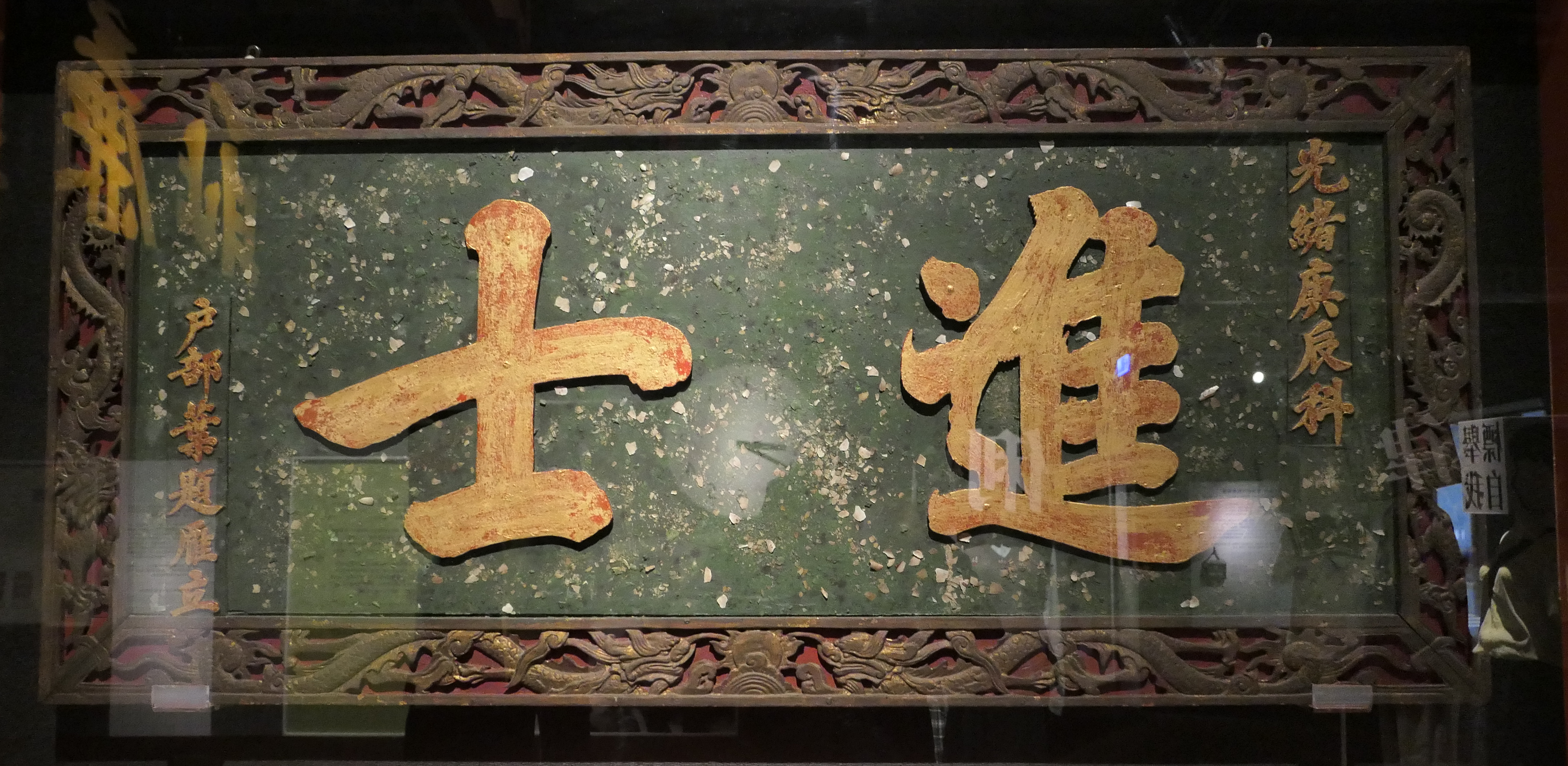 中文（台灣）: 清光緒庚辰科葉題雁進士匾。攝於國立臺灣歷史博物館。